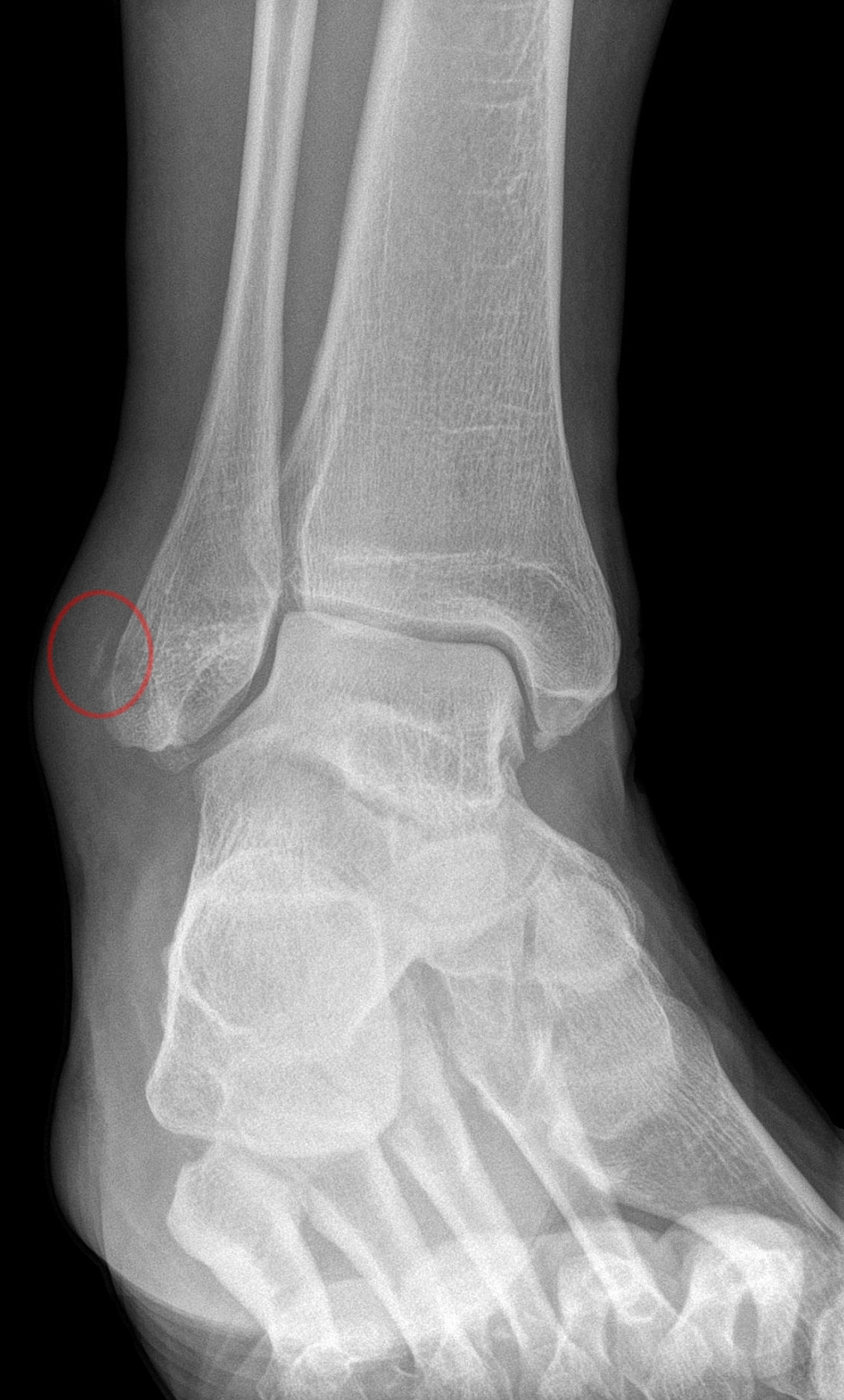 Röntgenbild bei Split-Läsion der Sehne des M. peroneus brevis nach Trauma. Man erkennt eine kleine abgescherte Schale lateral des Außenknöchels. Sie ist Ausdruck des knöchernen Ausriss des Retinaculum peroneale.